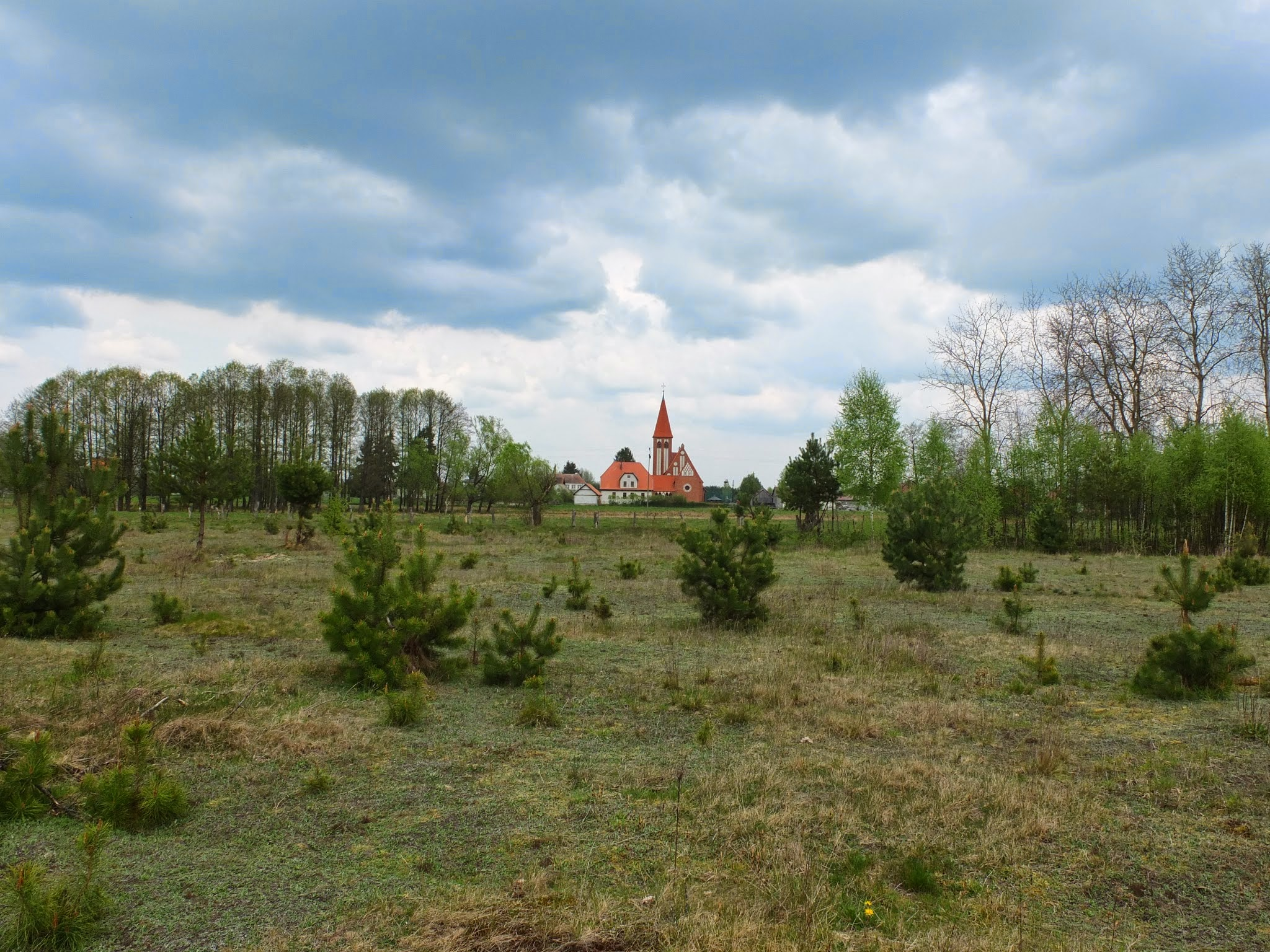 Gawrzyjałki - dawny kościół ewangelicki, od lat 80. XX w rzymskokatolicki filialny p.w. św. Wojciecha, 1907-1908